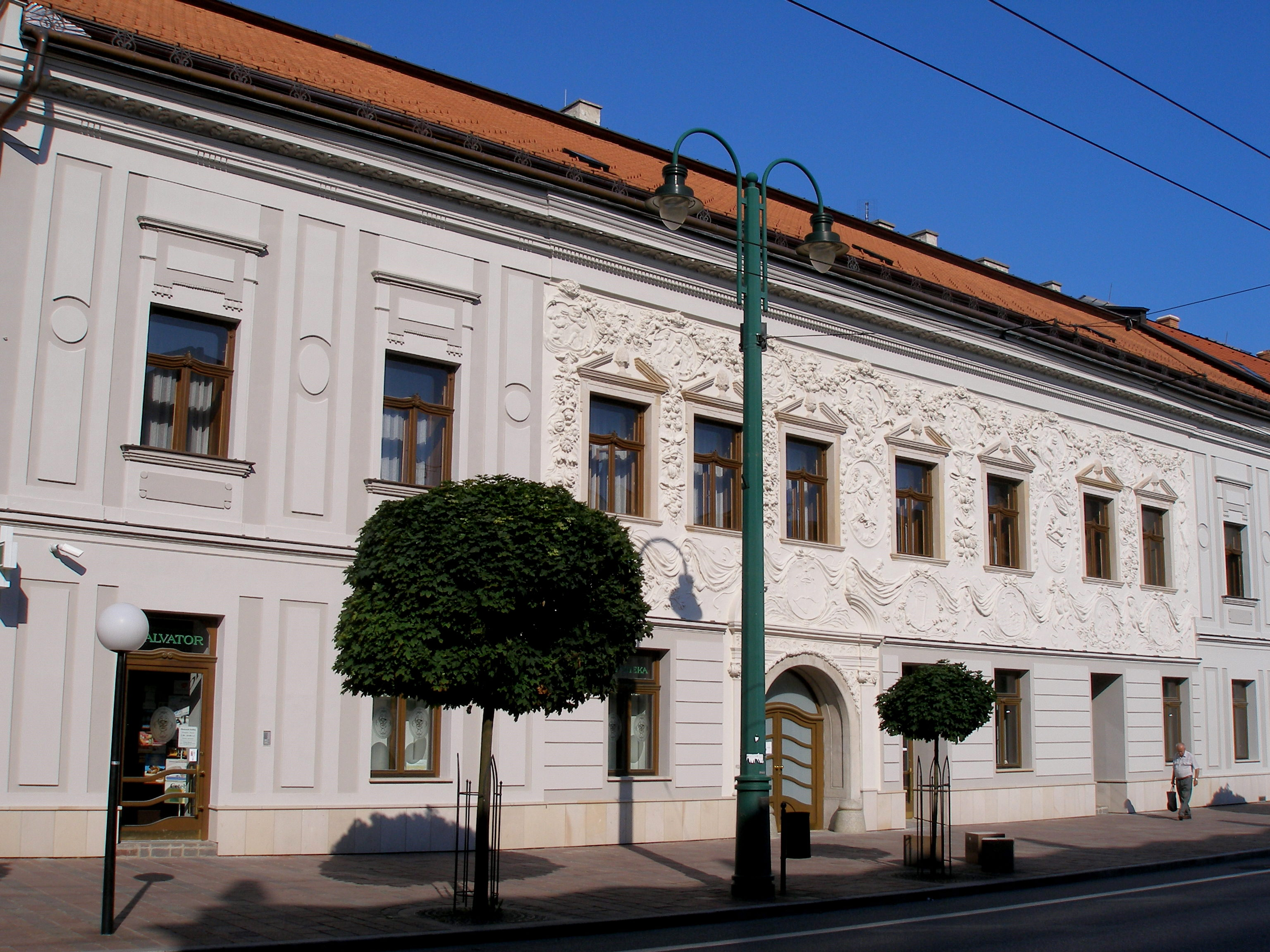 Historické centrum mesta Prešov.Palác Klobušickovcov z polovice 18.storočia. V týchto miestach stal aj rodný dom Ladislava Berčeniho (1689 až 1778 ), ktorý bol maršalom Francúzska. Hlavná ulica.Sídlo Krajského súdu v Prešove.